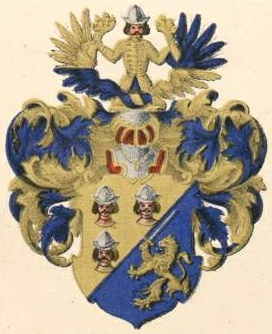 Schreiterfeldi suguvõsa aadlivapp